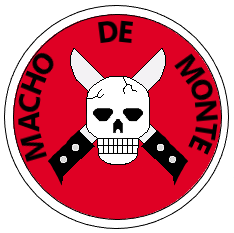 Escudo de la Séptima Compañía de Infantería Macho de Monte.